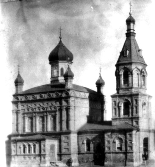 Церковь Покрова Пресвятой Богородицы в хуторе Нижнежуравский Области Войска Донского.